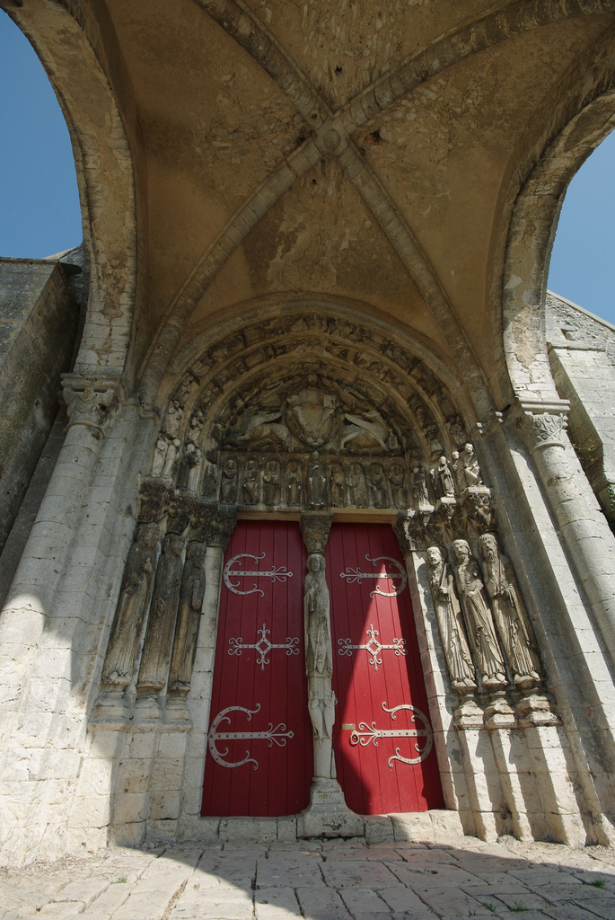 Porche de l'église St Loup de Naud